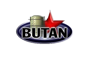 Logo des Wuppertaler Butan Club (seit 2018 geschlossen).